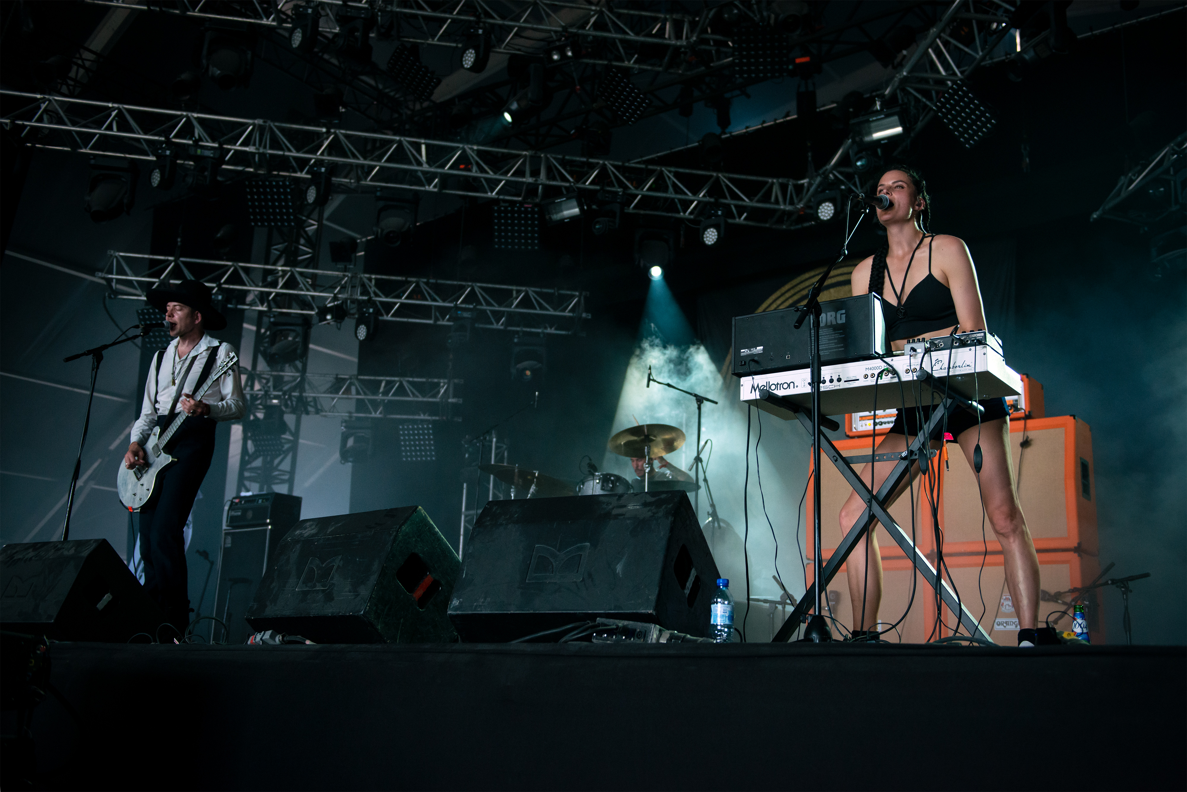 Concert du groupe Arabrot au Hellfest 2019.